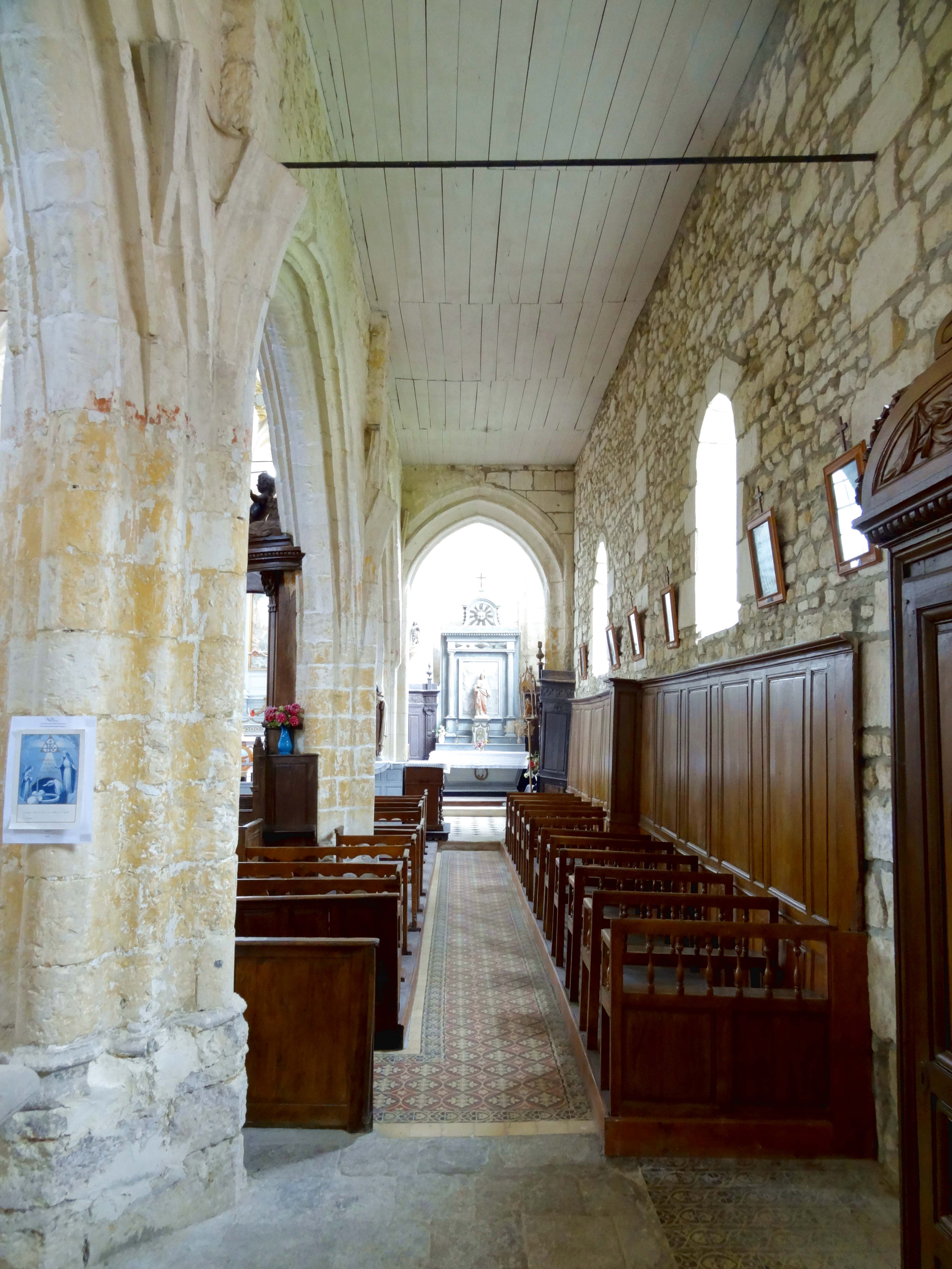 Intérieur de l'église - voir titre.